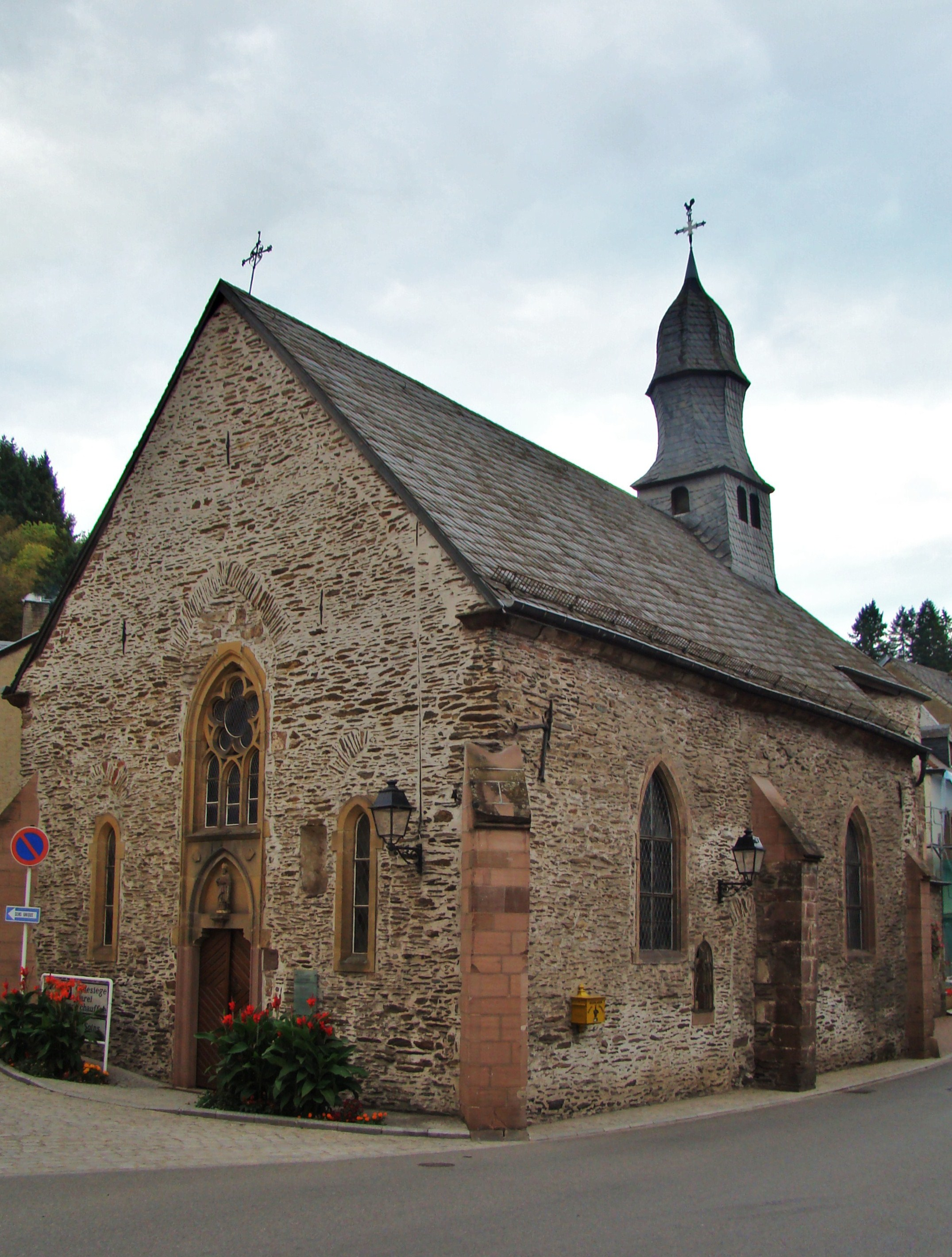 au centre de Vianden la chapelle est inscrite au cadastre de la commune de Vianden, section B, sous le n° 1712